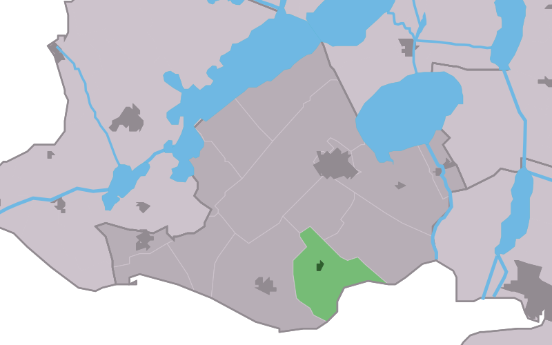 Kaartsje fan himrik fan Nijemardum